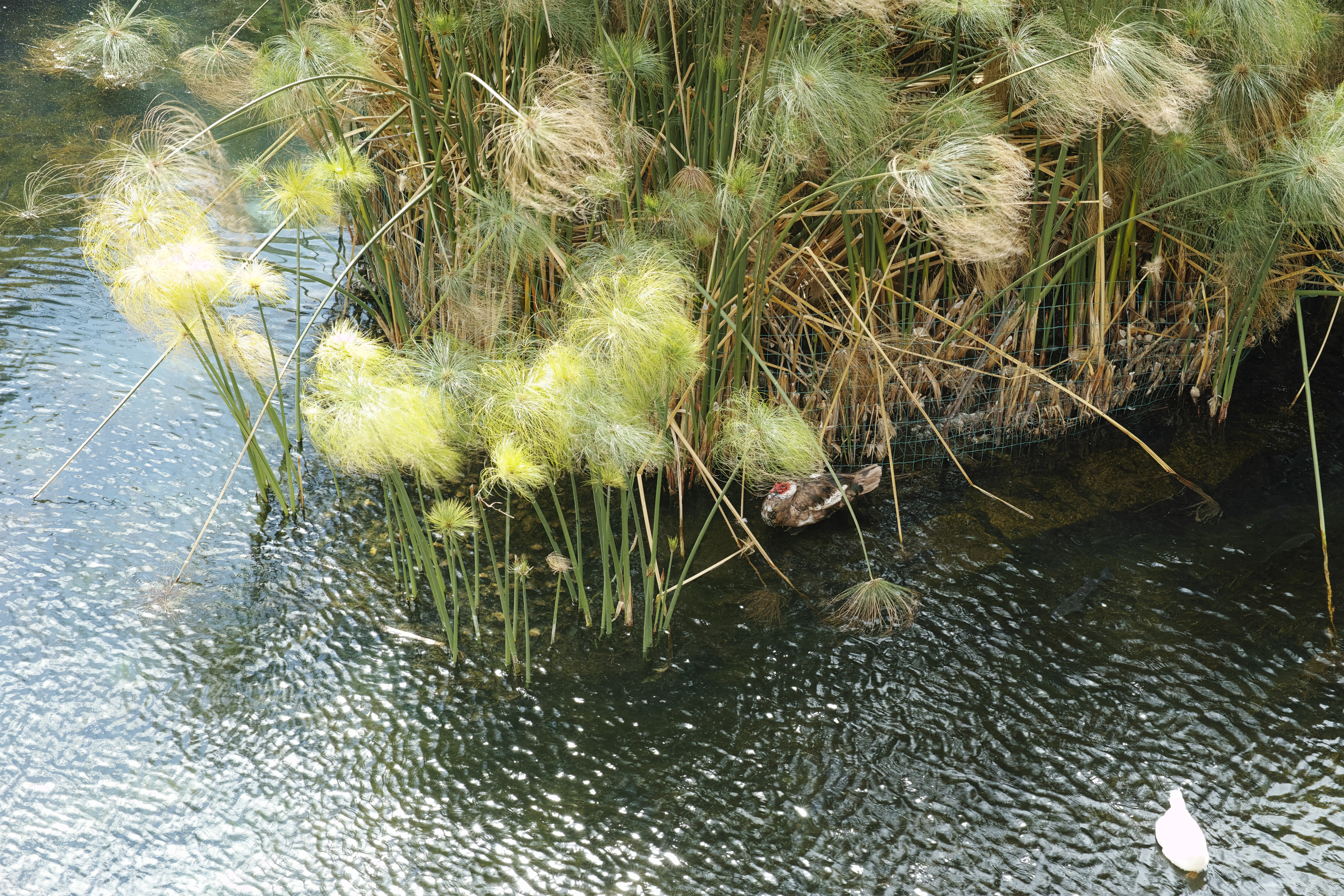 Papyrus im Fonte Aretusa, Sizilien. Einziges natürliches Vorkommen von Papyrus in Europa.